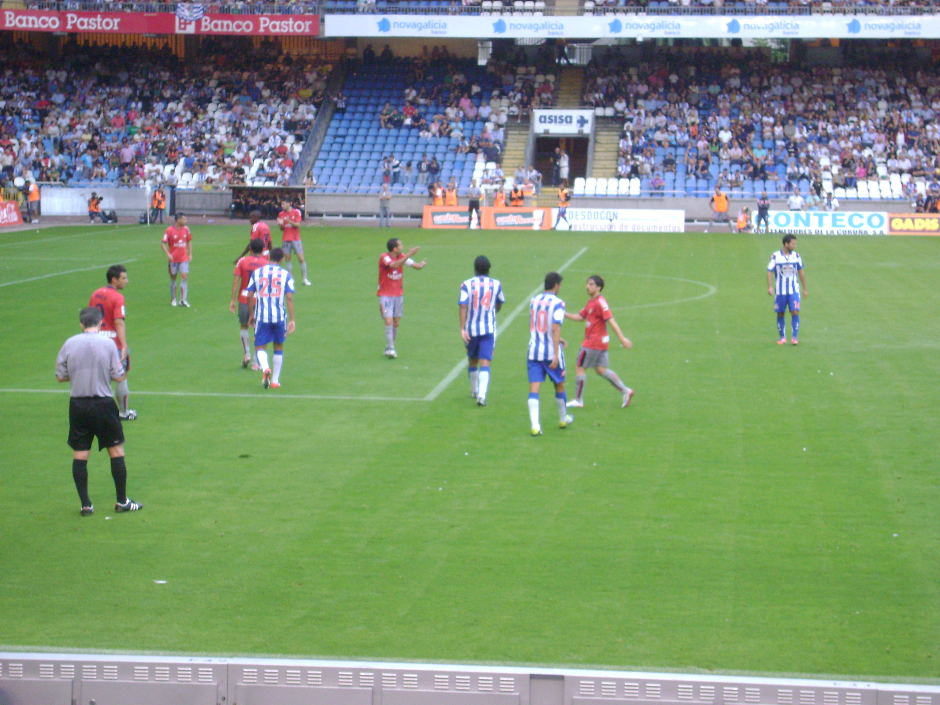 Partido de fútbol Deportivo - Osasuna